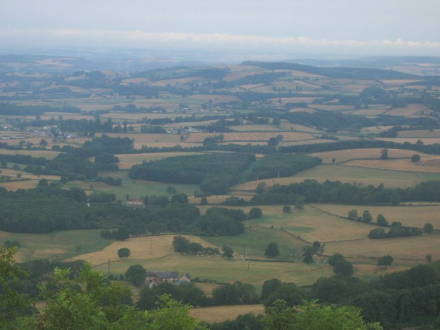 Paysage du Morvan, Bourgogne, France : vue de Château-Chinon (Nièvre)